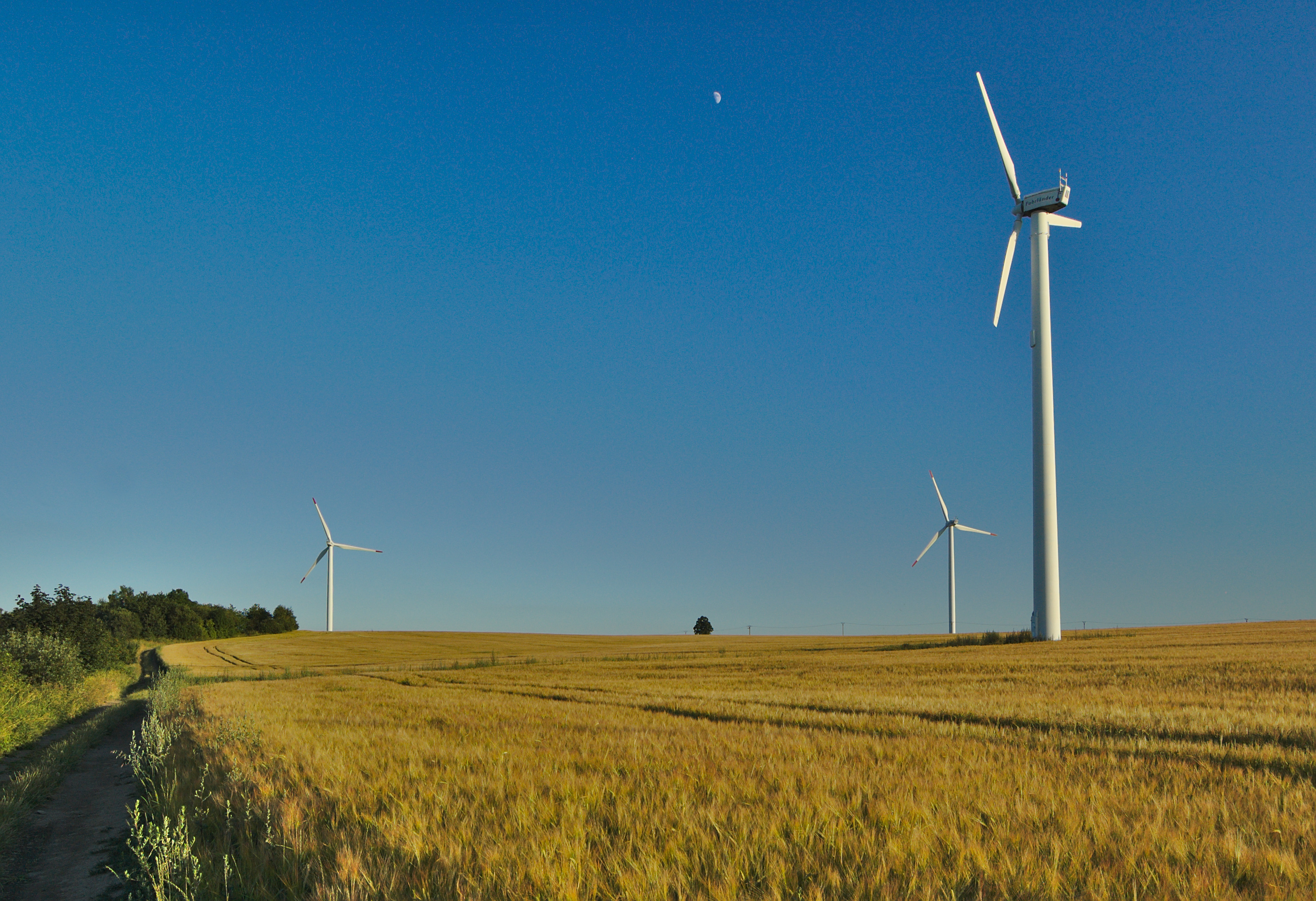 Všechny tři protivanovské větrné elektrárny - v popředí elektrárna Svatého Eliáše, Protivanov, okres Prostějov